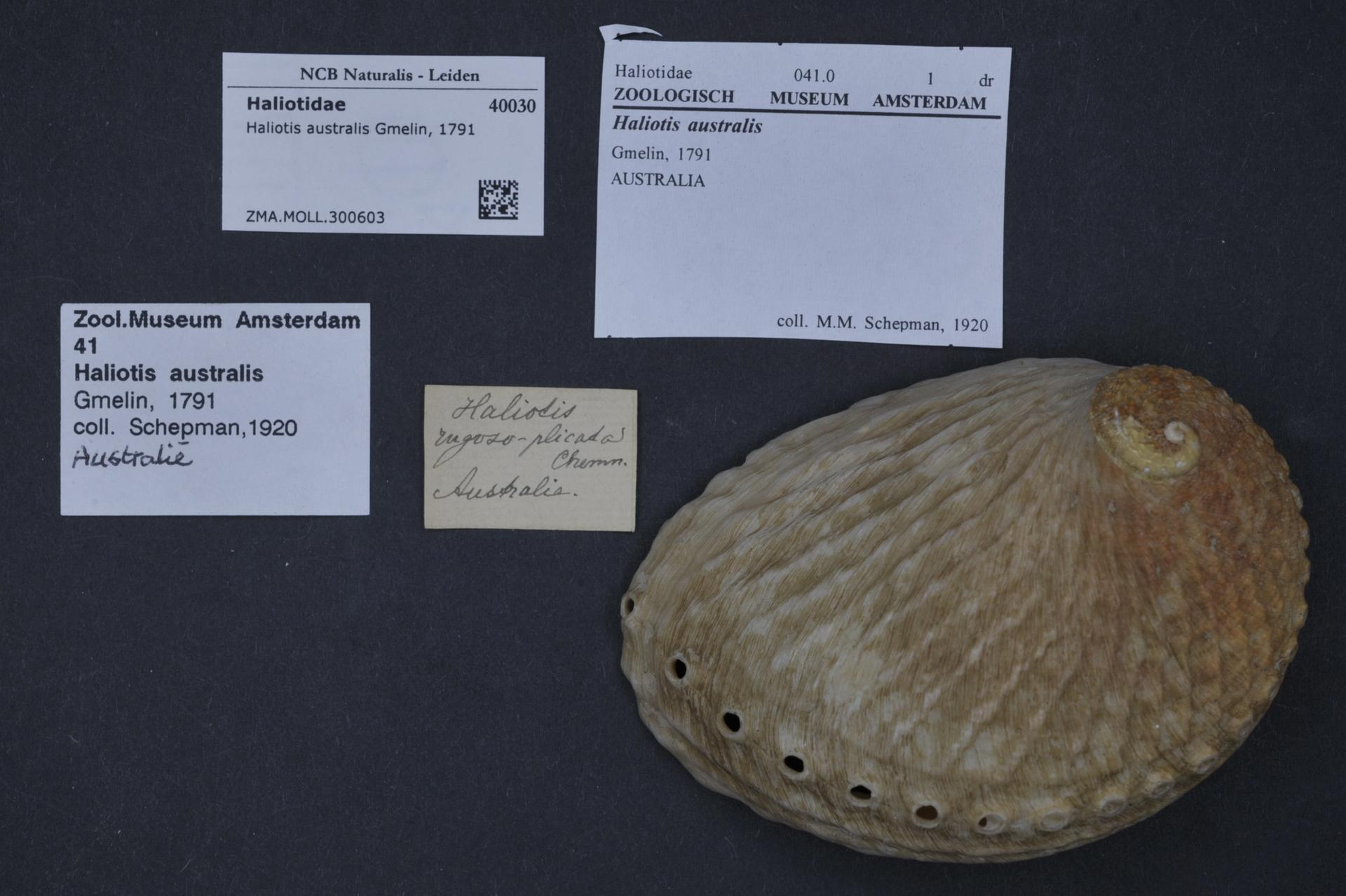 Haliotis australis Gmelin, 1791